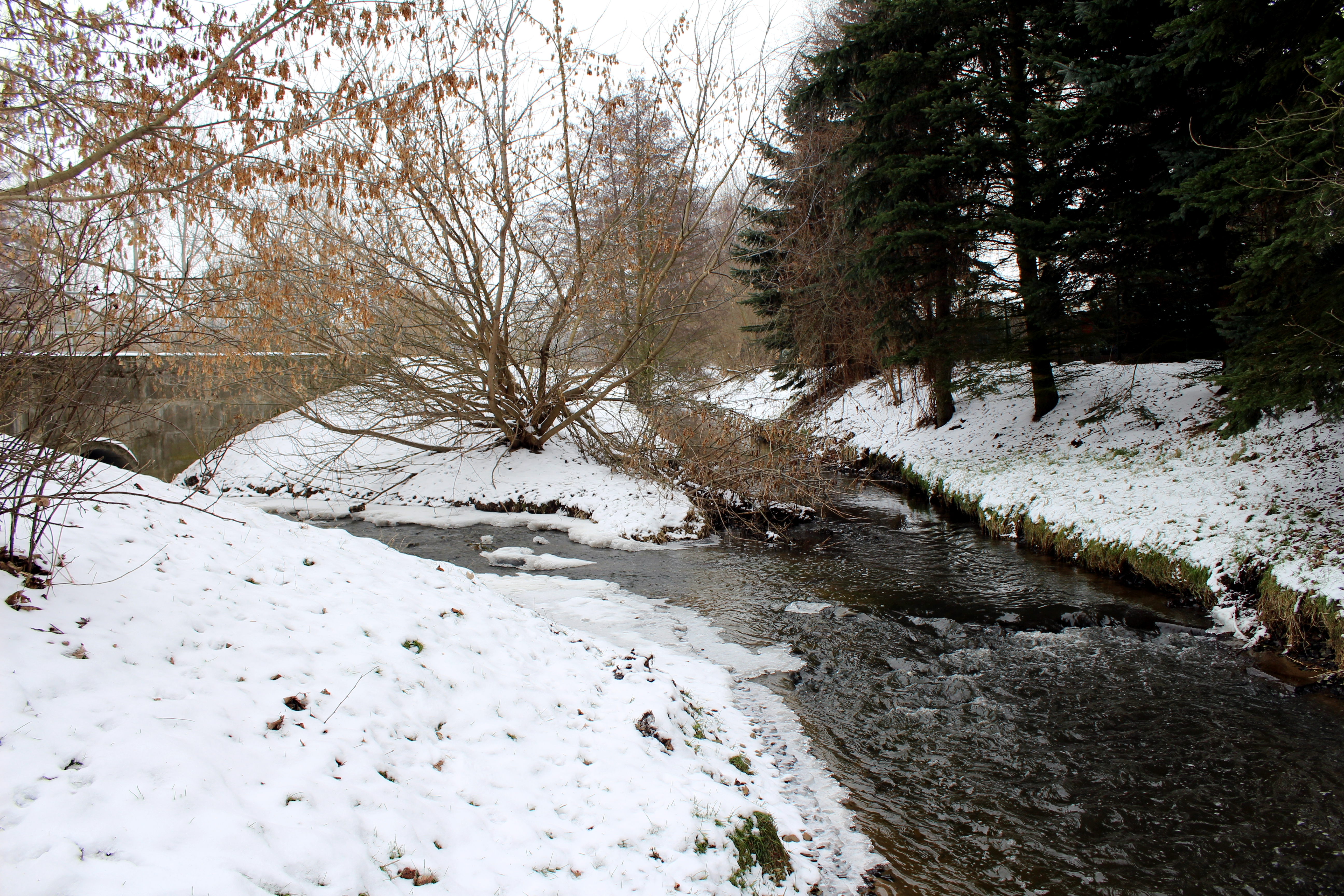 Der Lietzengraben fließt zwischen Berlin-Buch und Berlin-Karow in die Panke.